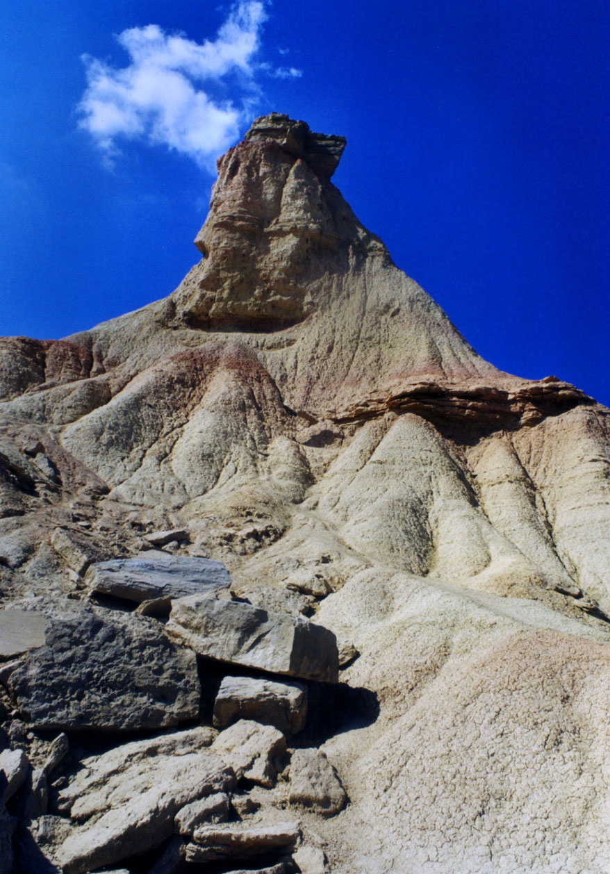 Bardenas Reales, Navarra, Spain